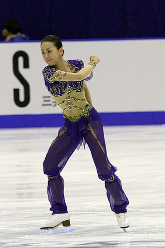 Ма́о Аса́да на 2011 NHK Trophy .